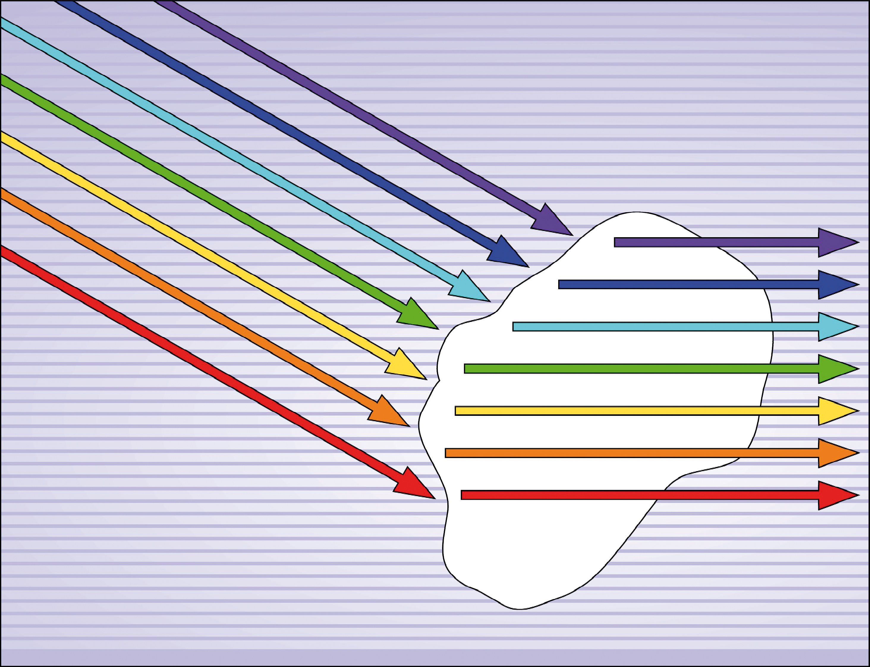 Koloreak ikusten dugu materiak zer argi espektroaren frekuentziak absorbatzen dituen arabera. Materia zuriak, esaterako, ez du hartzen espektroaren ezer. horregaitik gure begietara ailegatzen da zuri kolorea.